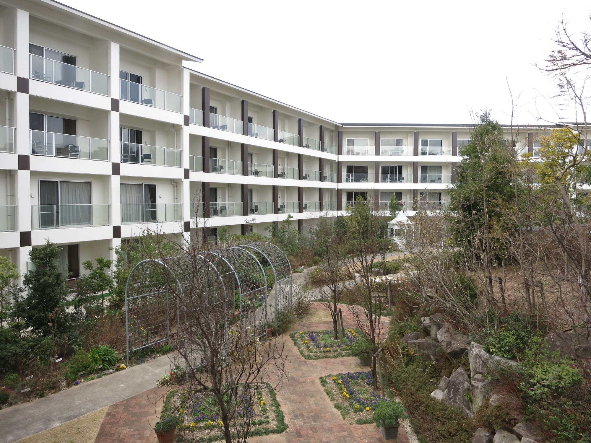 ホテルウェルシーズン浜名湖 ガーデンコート棟（改装時に新築された部分）